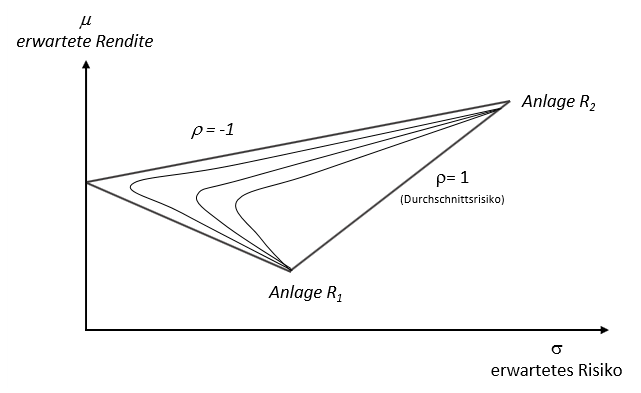 Effizienter Rand